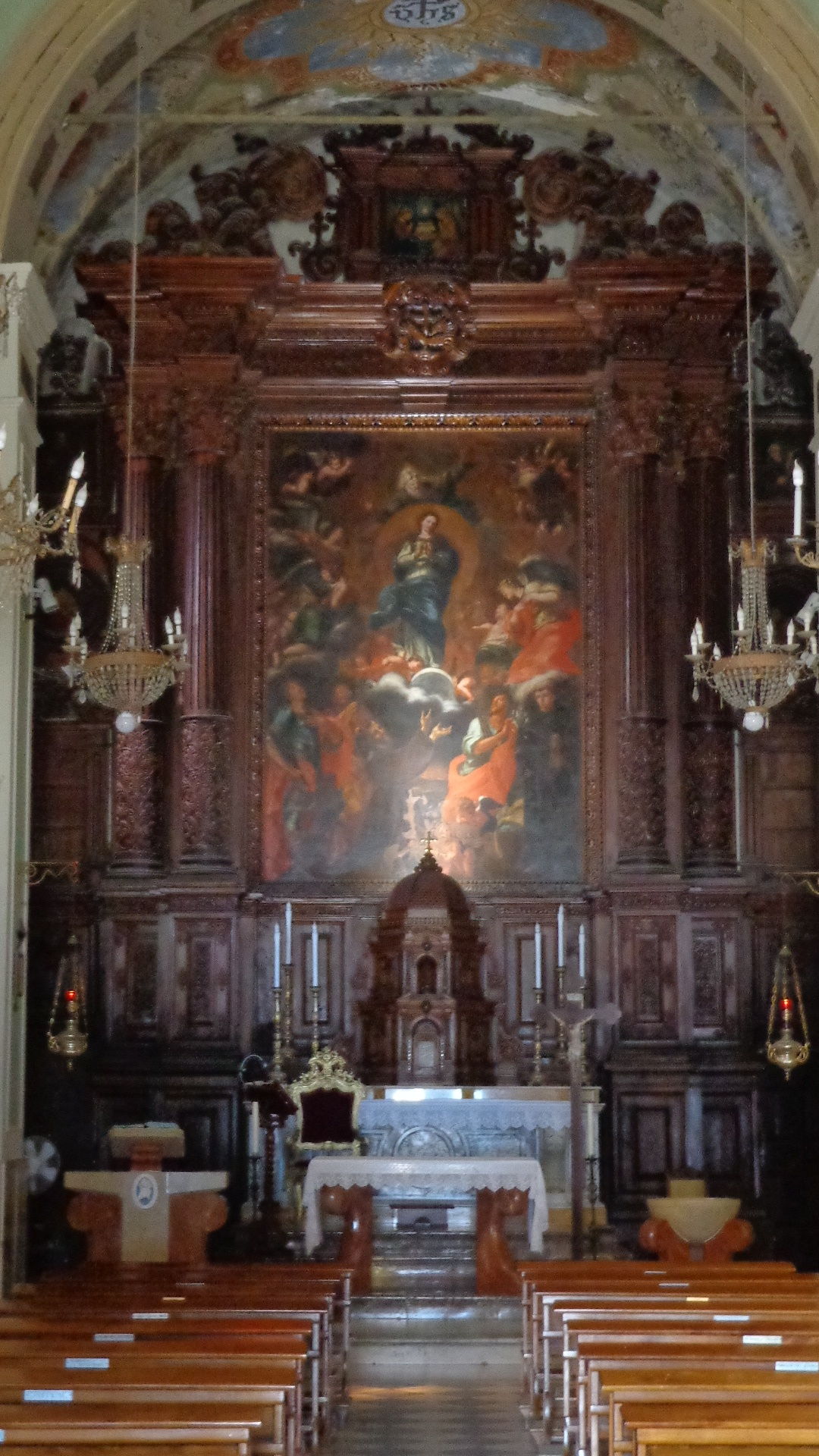 Presbiterio